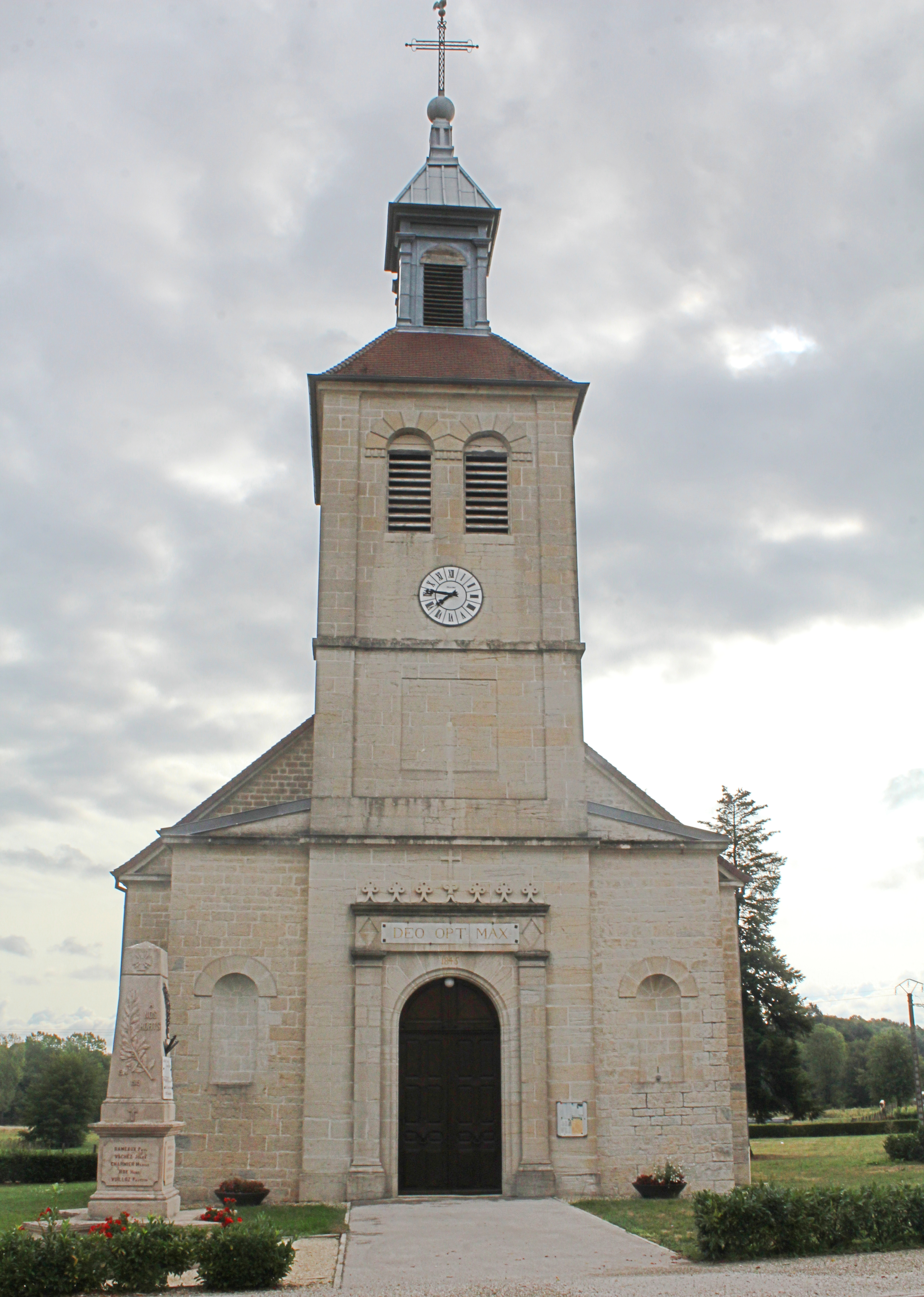 Église Sainte-Agnès de Vincent, Vincent-Froideville.